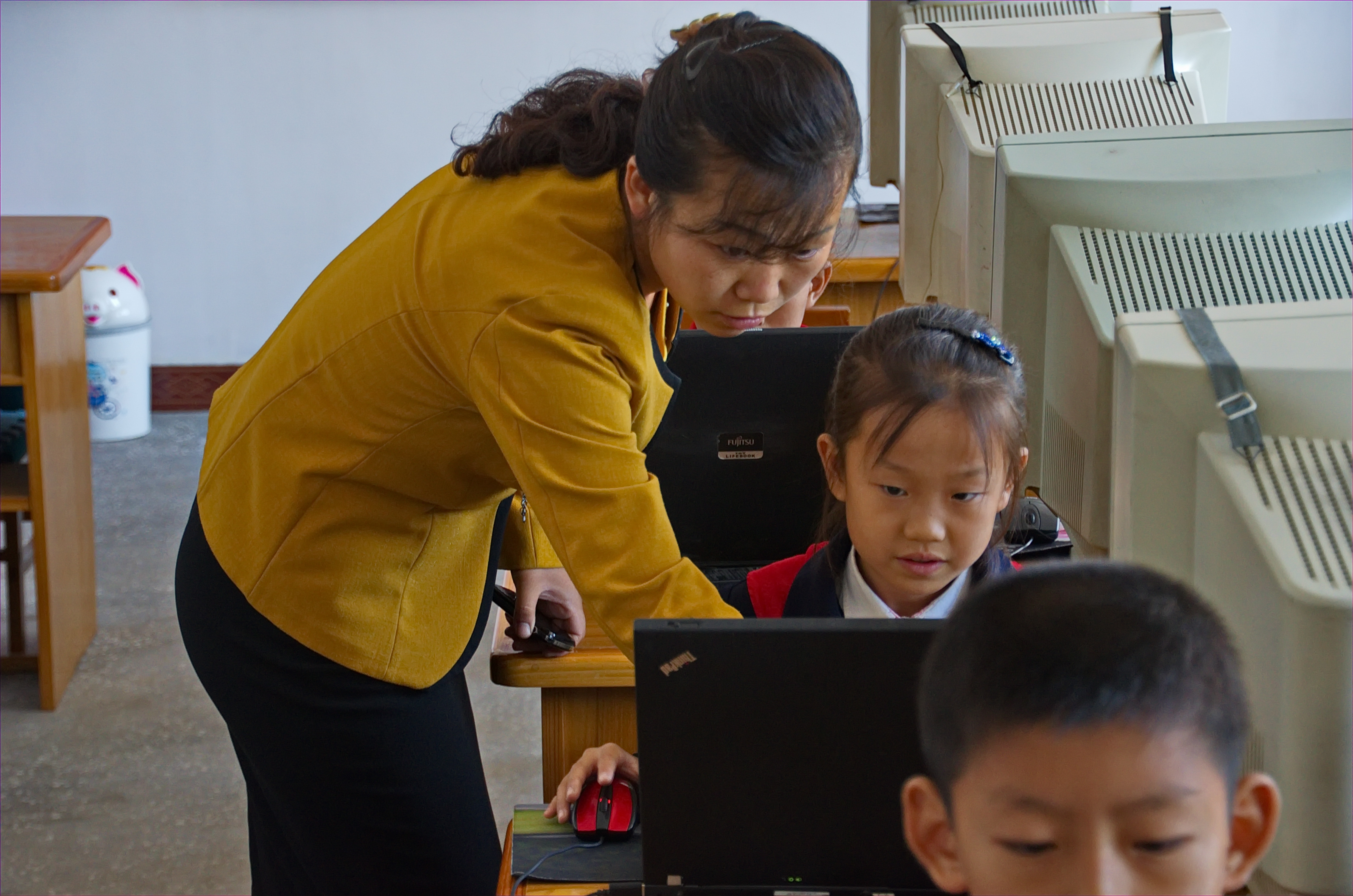 Nordkorea 2015 - Pyongsong - Grundschule